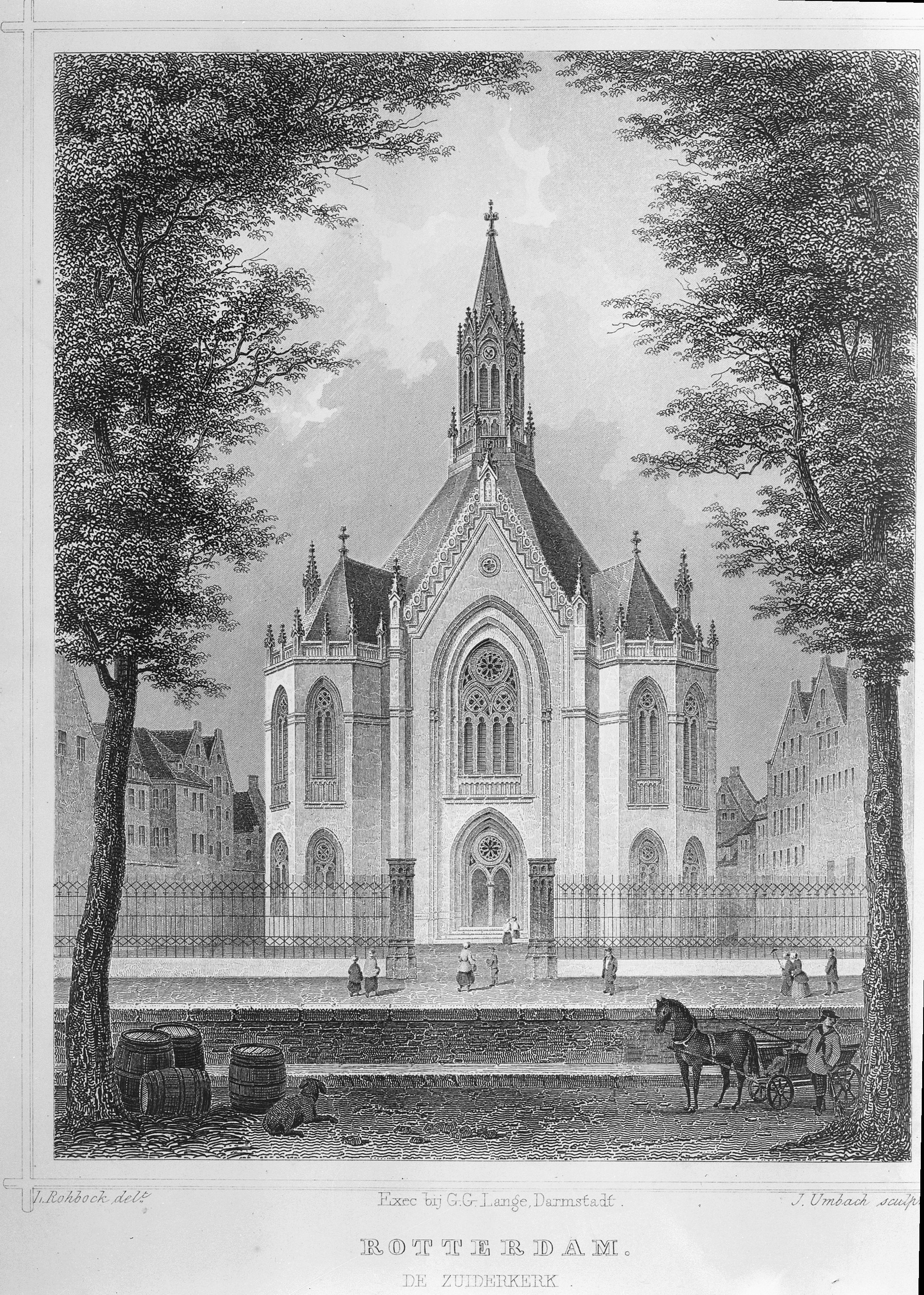 Zuider kerk: aanzicht